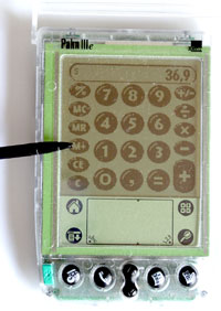 Palm PDA mit Bedienstift und Taschenrechner-Anwendung